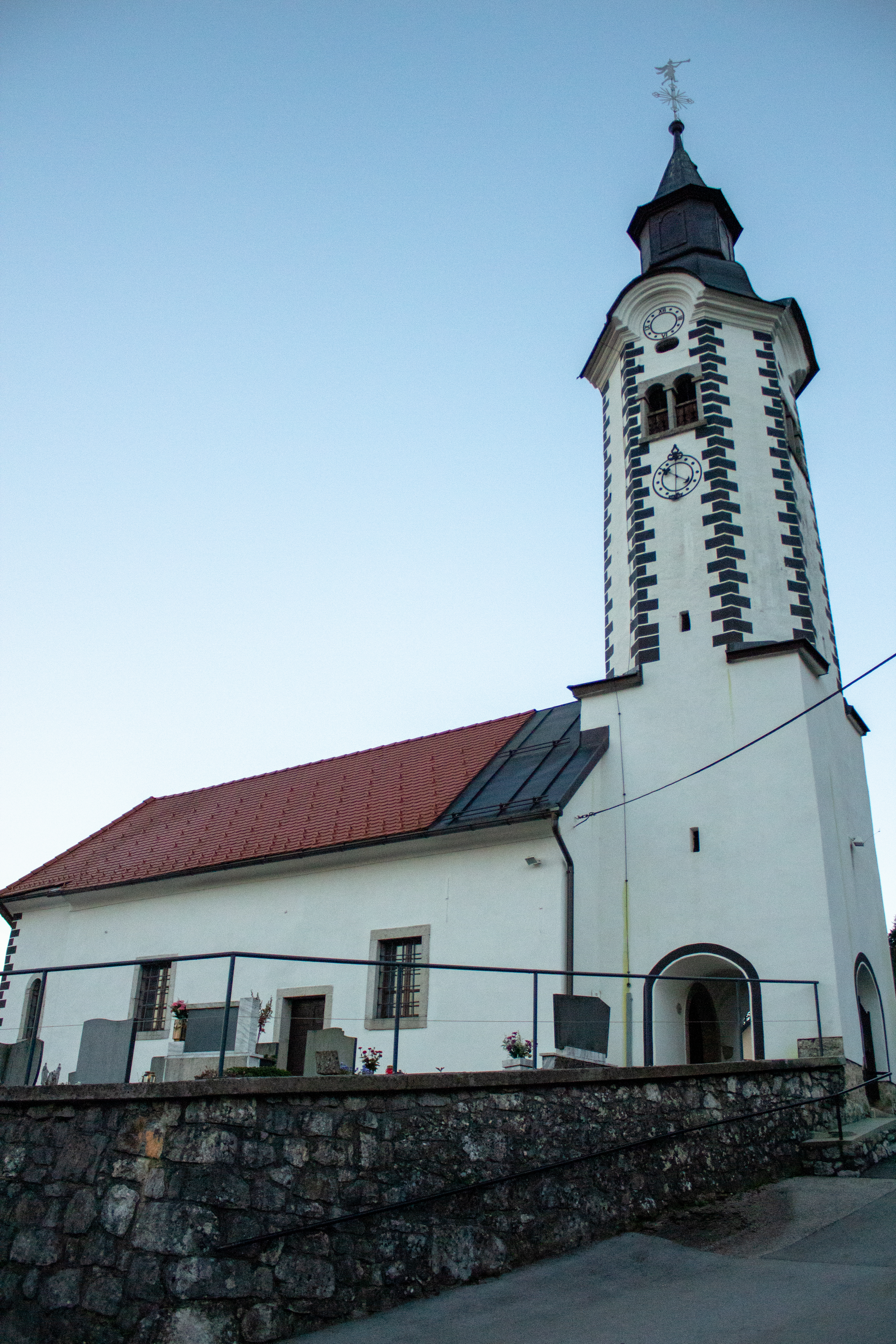 Cerkev stoji na pokopališču, ki leži na rahli vzpetini na robu vasi, pod pobočji Kočevskega Roga ob Partizanski magistrali. This media shows a cultural heritage object of Slovenia with the EŠD number: 2574